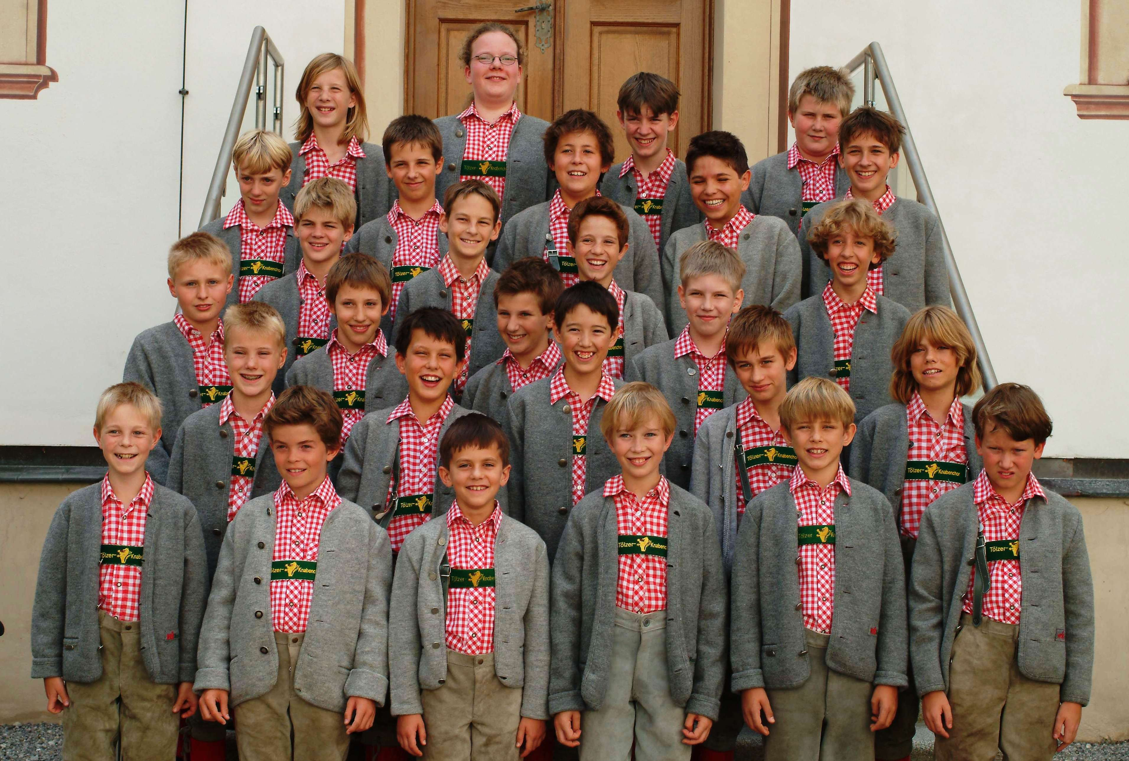 Coro de niños de Tölz, Alemania